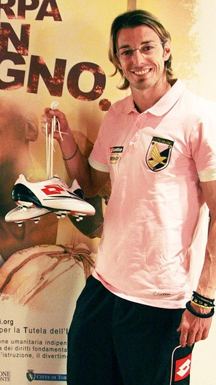 Federico Balzaretti avec le maillot de l'US Palerme